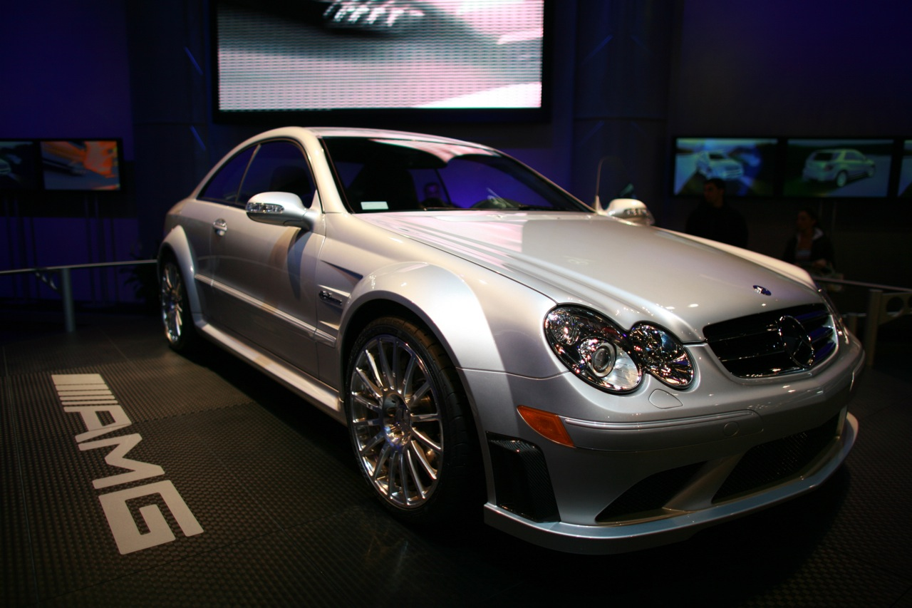 MB CLK 63 AMG Black SeriesMB CLK 63 AMG Black Series